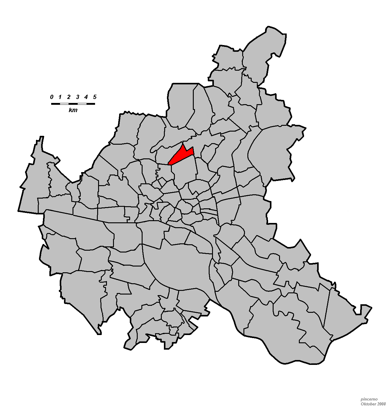 Hamburg: Stadtteil Hamburg-Alsterdorf